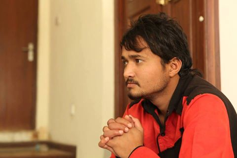 राजेश नाथ नेपाली टेलि श्रीखंला मेरि बास्सैका कलाकार हुन ।